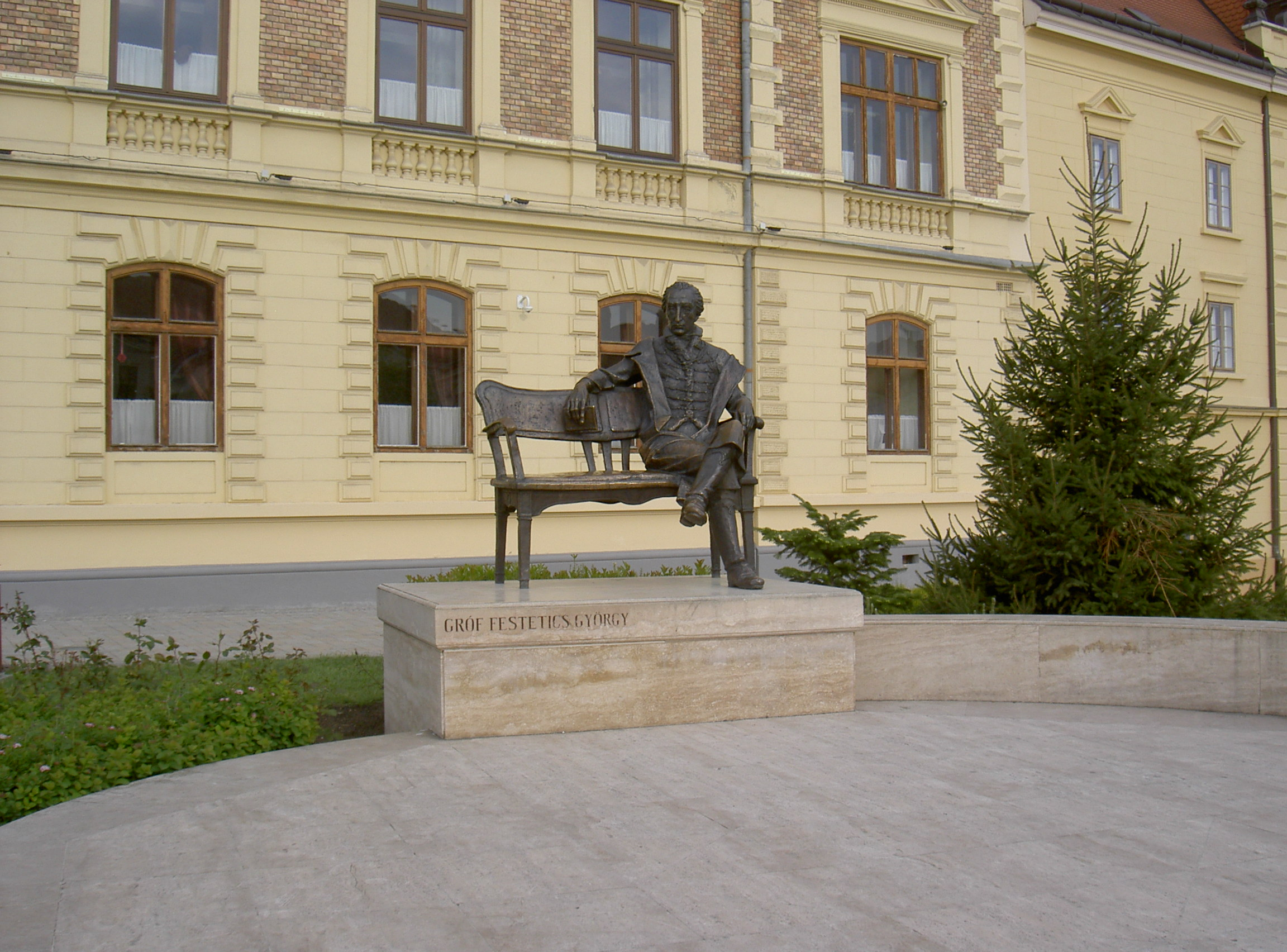 György Festetics Plastik in Keszthely